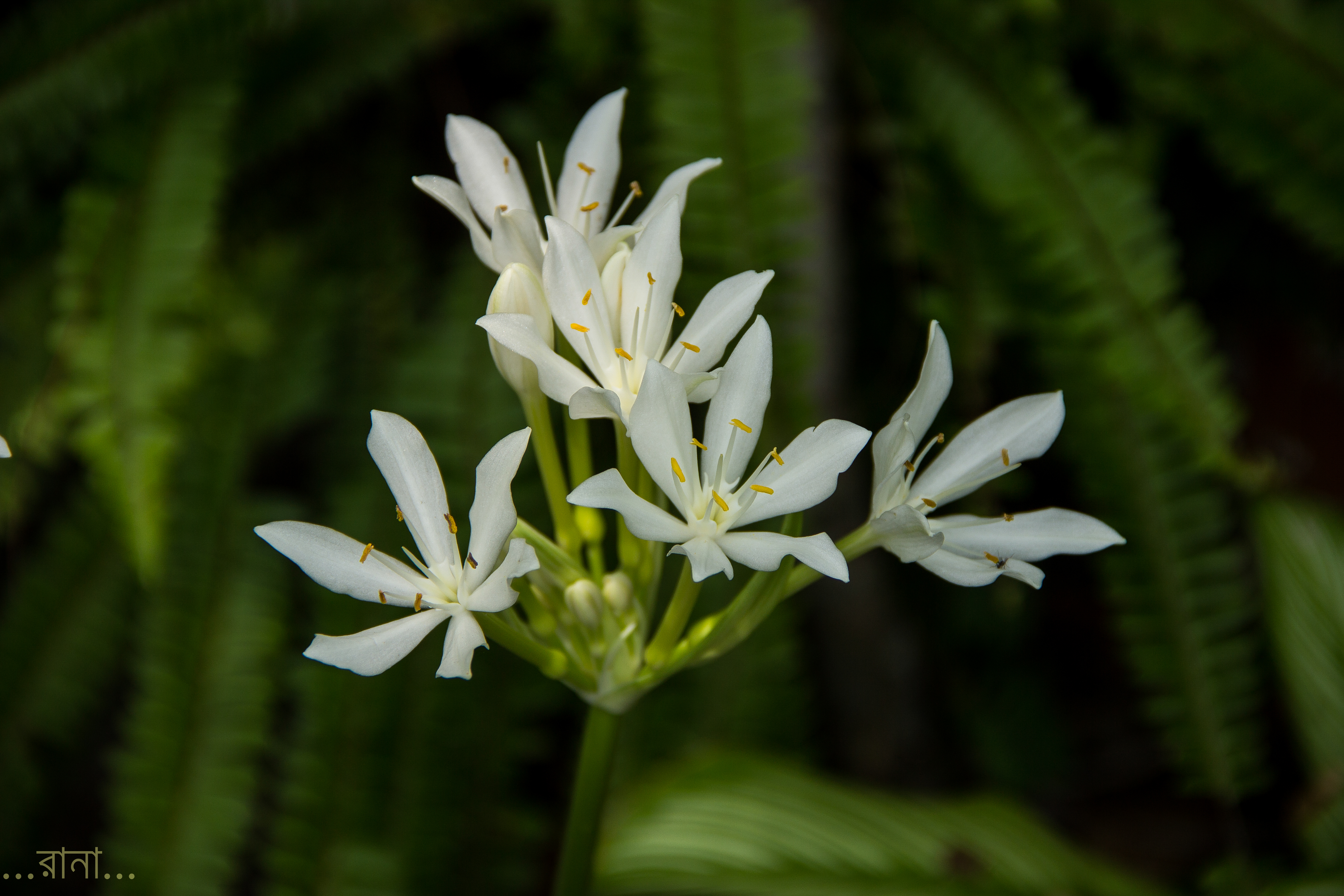 কার্ডওয়েল লিলি/ Proiphys amboinensis